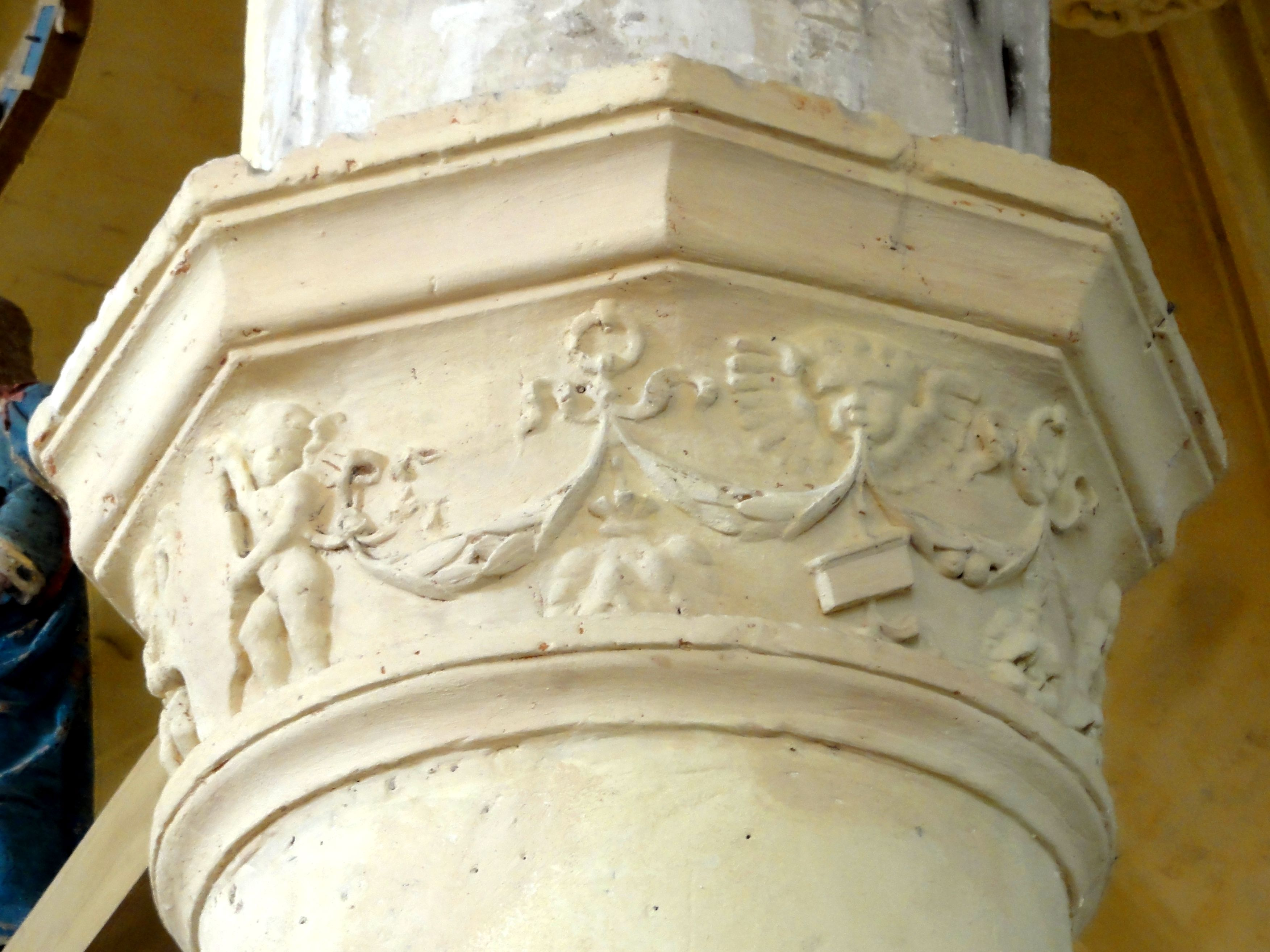 Chœur, grandes arcades du sud, chapiteau au début.